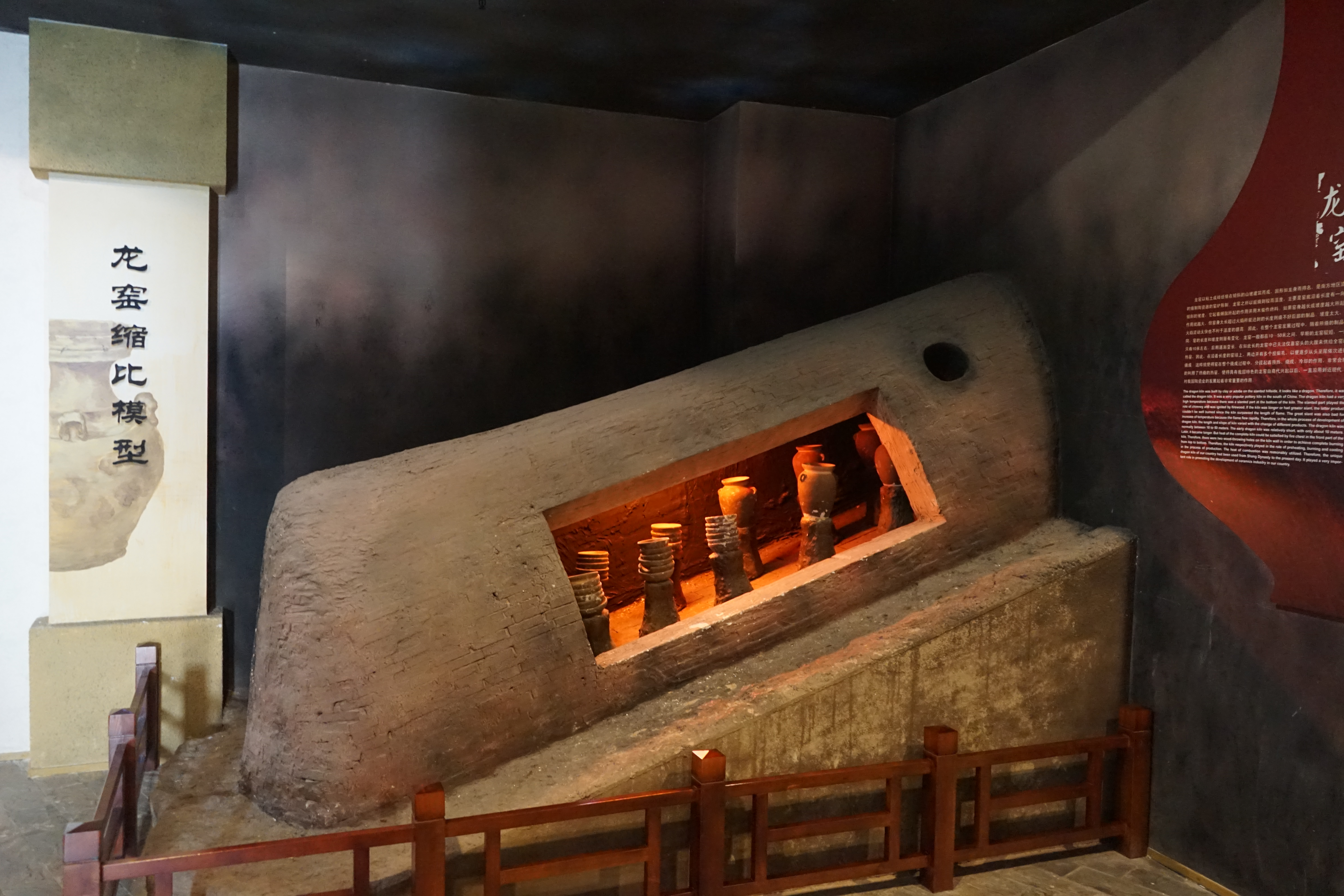 缩小版龙窑模型，萧山博物馆